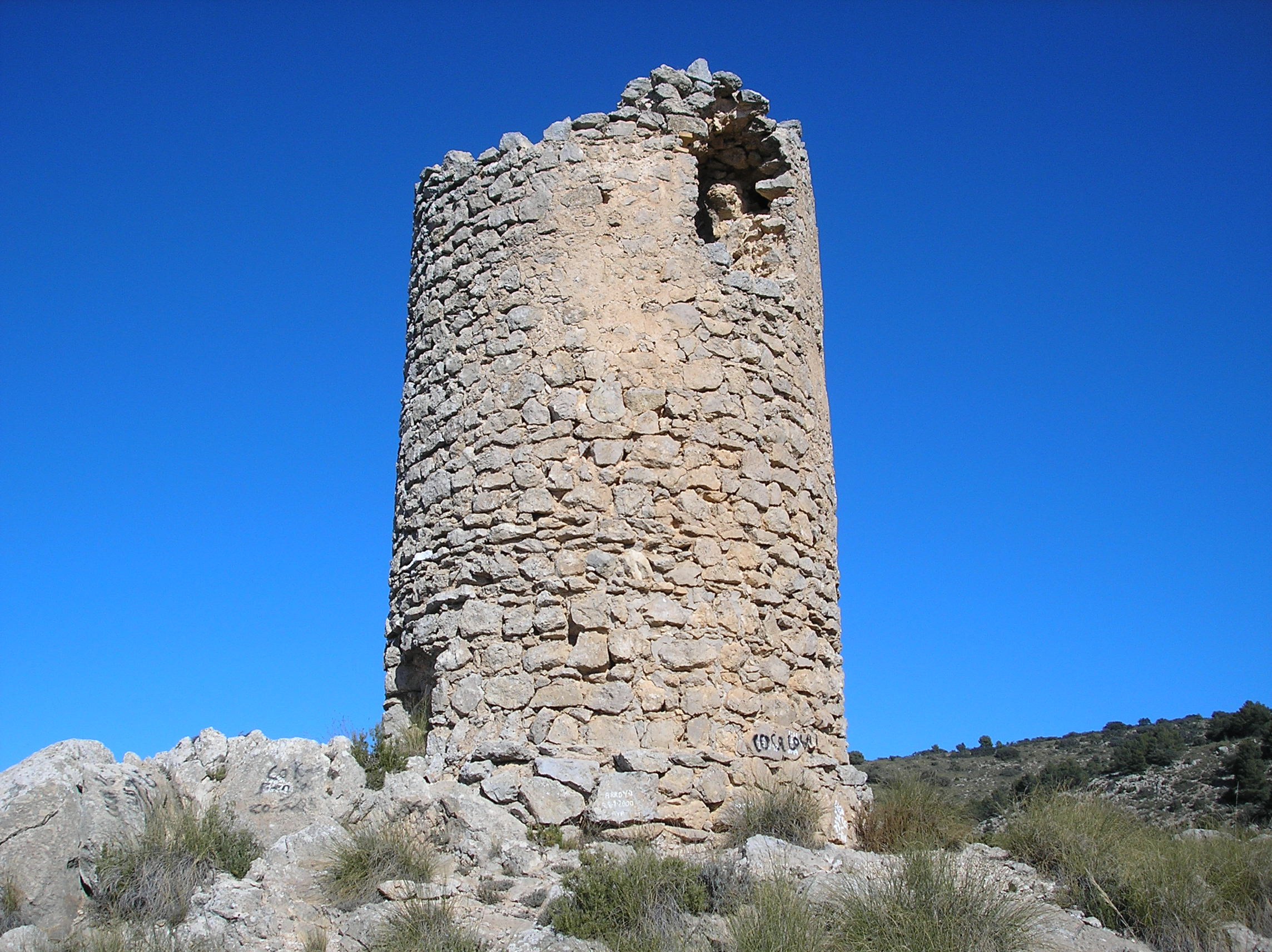 Torre nazarí de la Sierra de la Encantada (Huéscar, Granada, España)